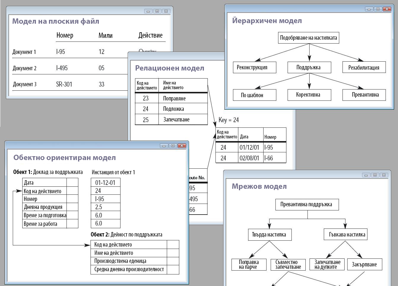 Колаж от 5те типа модели на бази данни